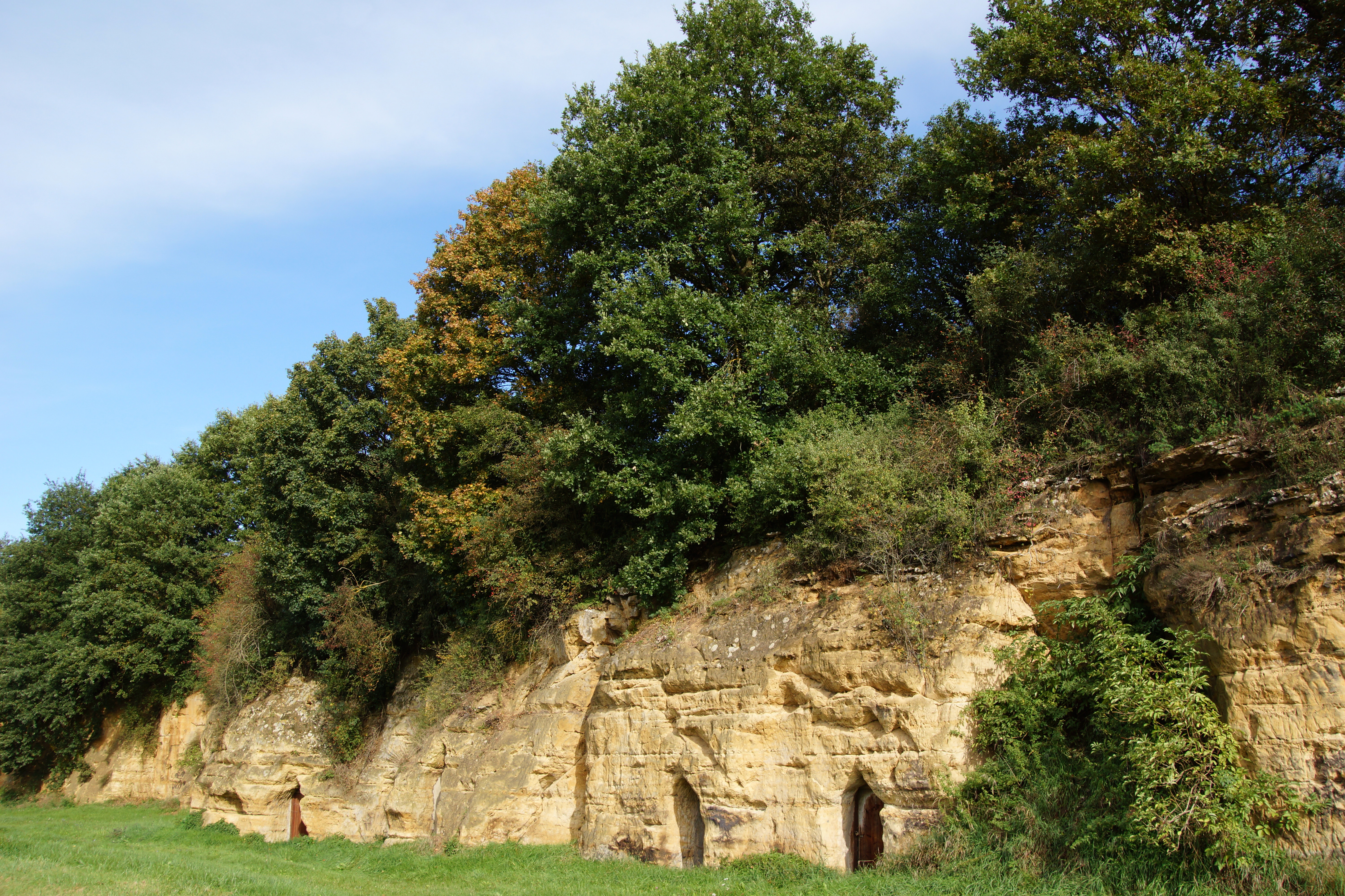 Niederhofen bei Pilsach in der Oberpfalz: Geokataster Bayern / Doggerfelswand bei Niederhofen / Geotop-Nummer: 373A030